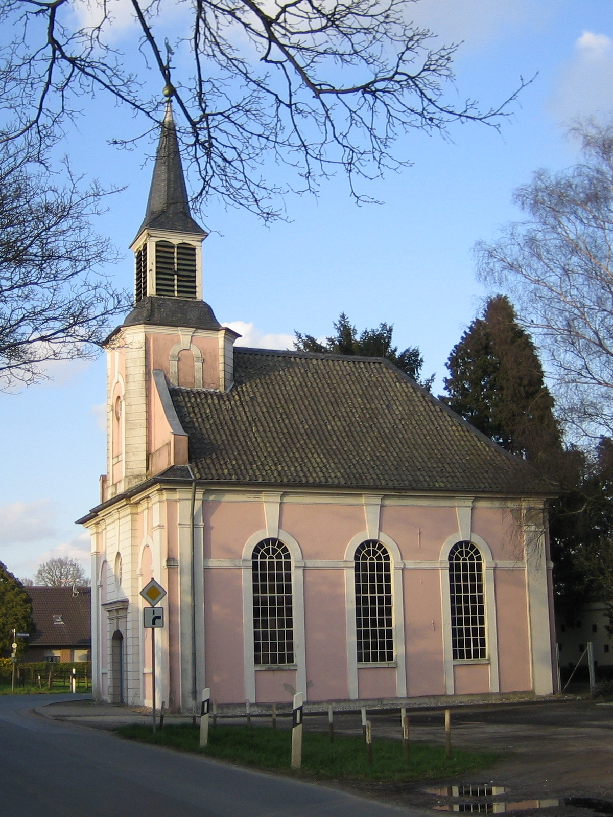 Goch-Pfalzdorf, evangelische Ostkirche